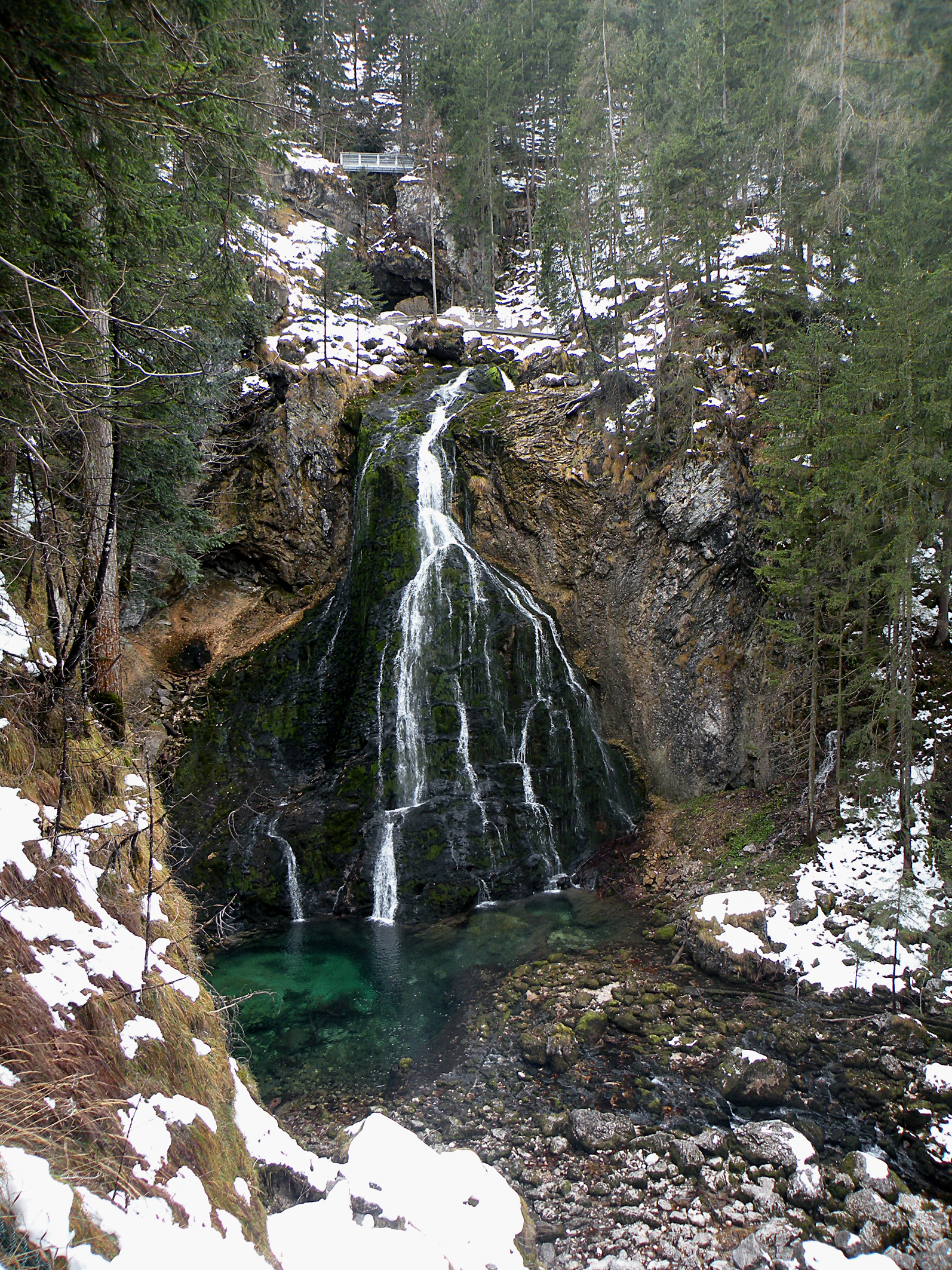 Golling a.d. Salzach. Wasserfall